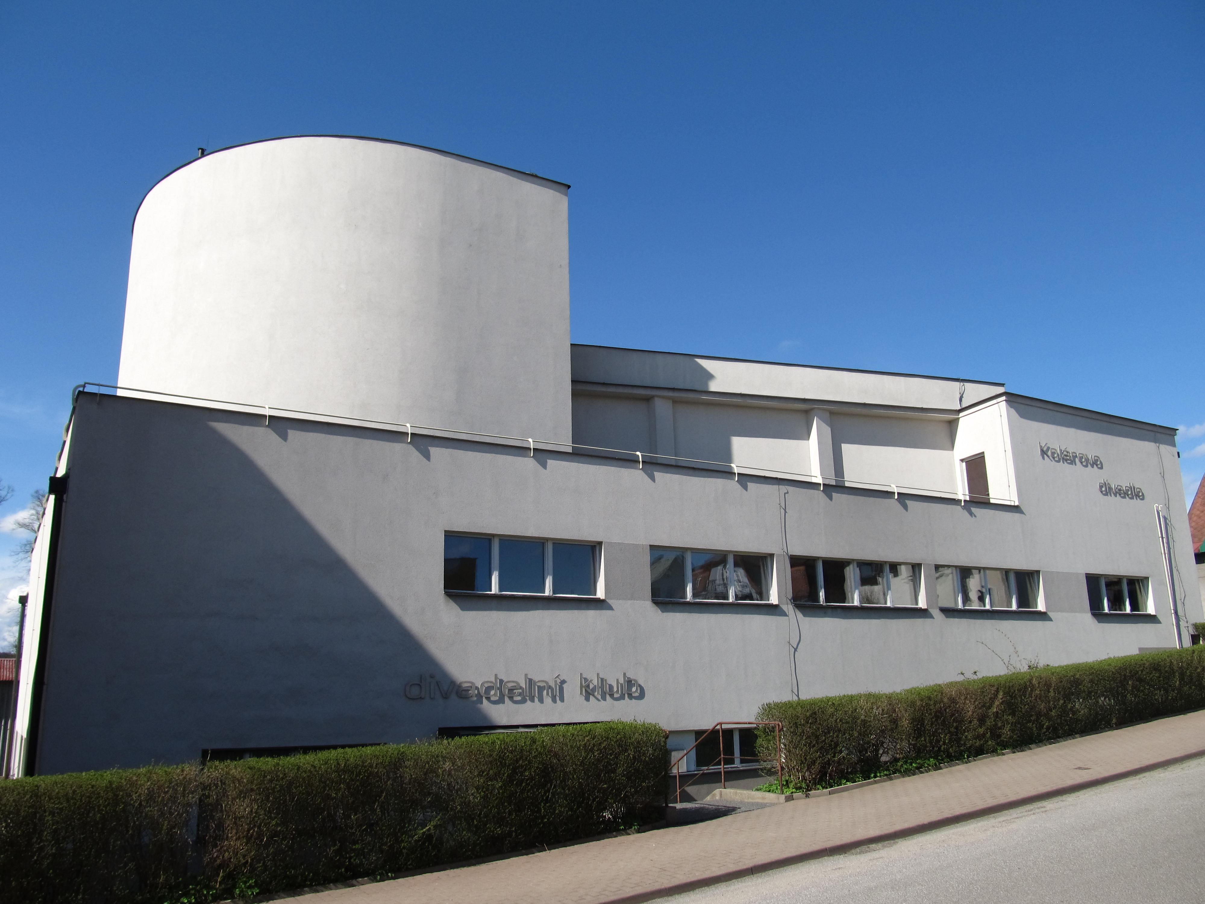 Kolárovo divadlo (1938-1940)